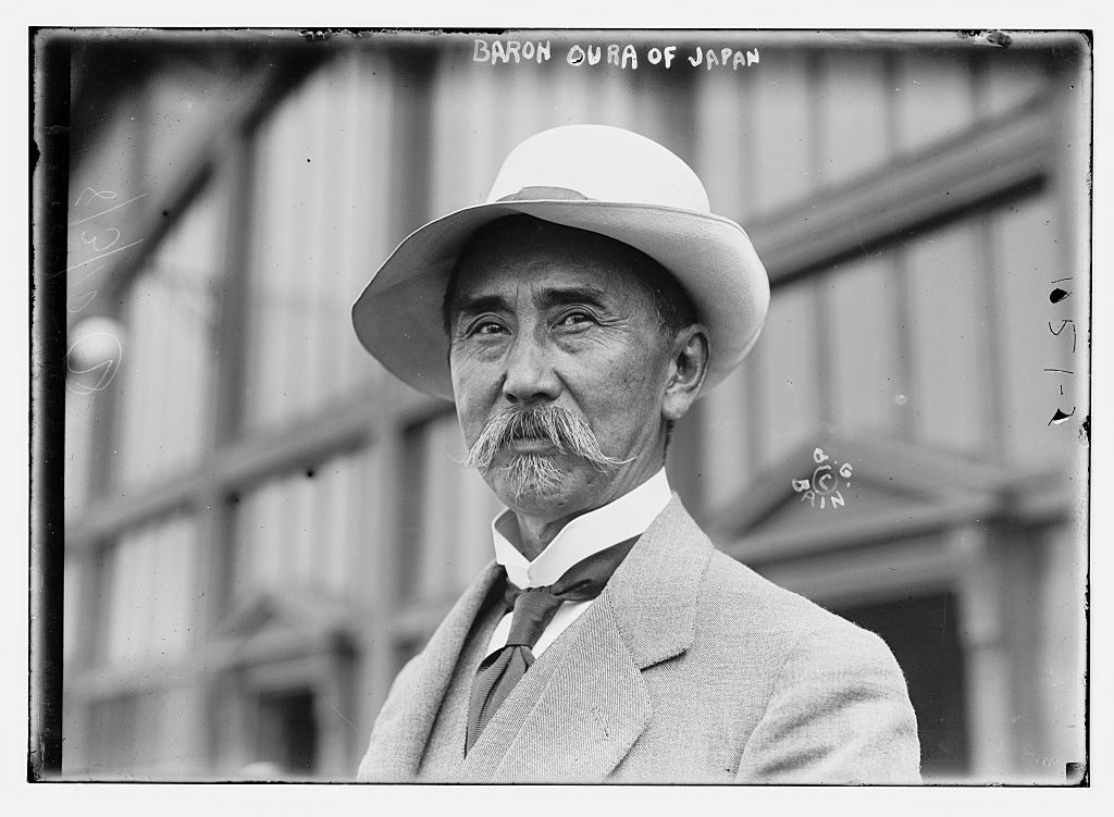 Baron Oura Kanetake